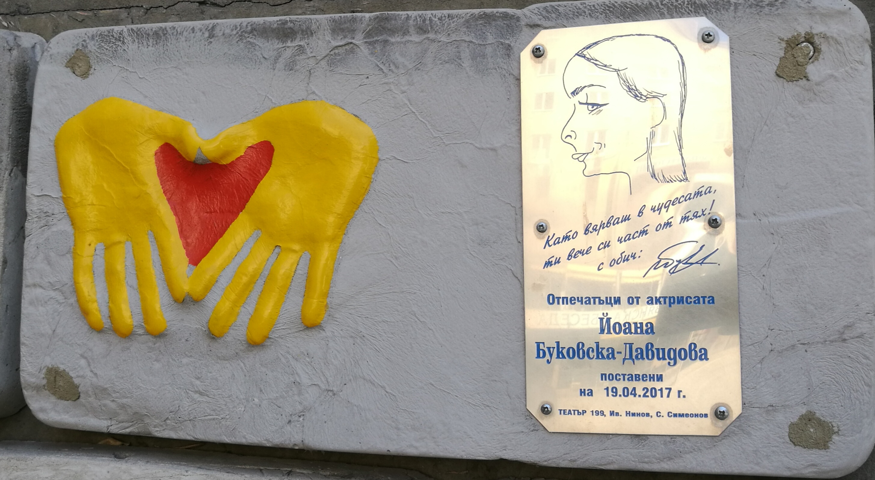 Стената на славата пред Театър 199 - пано с отпечатъци, послание и шарж на Йоана Буковска - Давидова.